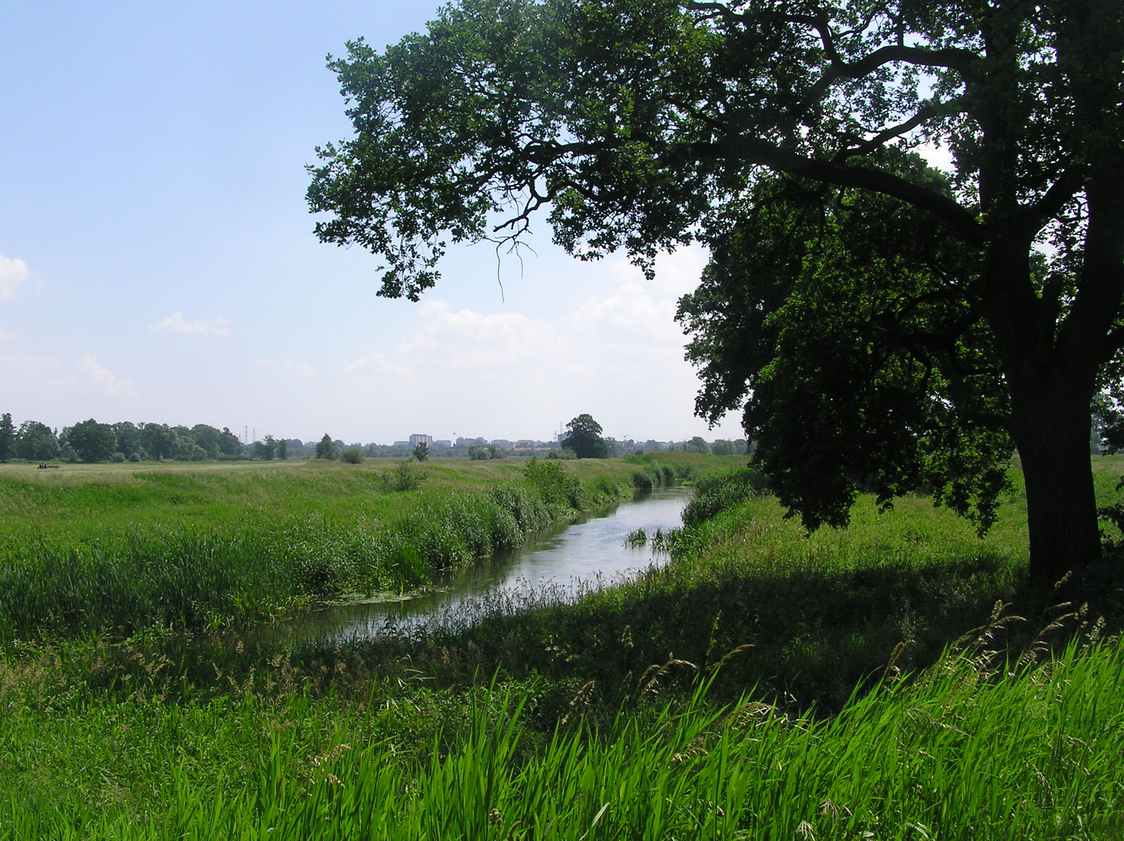 Widawa rzeka (dopływ Odry), odcinek pomiędzy osiedlami Sołtysowice - Kłokoczyce we Wrocławiu.